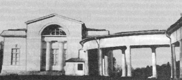 Елизаветино (усадьба Покровское-Стрешнево). Ротонда (не сохранилась)